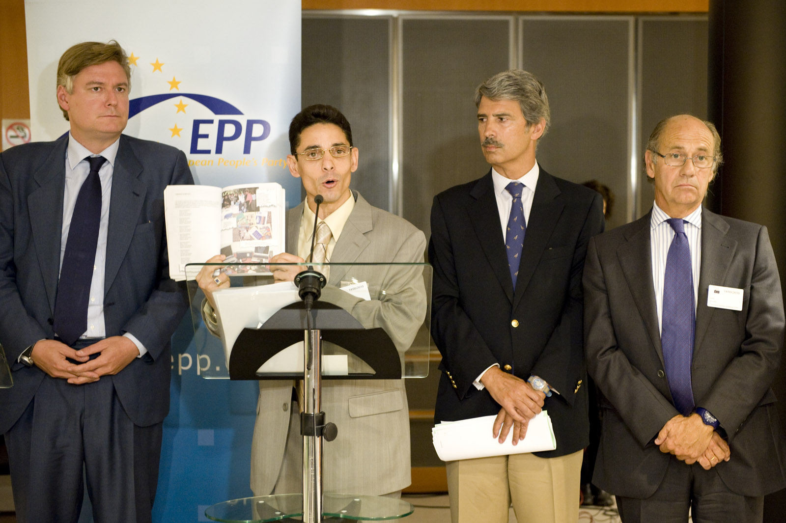 Antonio López-Istúriz White, Jose Ignacio Salafranca Sánchez-Neyra. EPP Political Assembly 13 September 2010